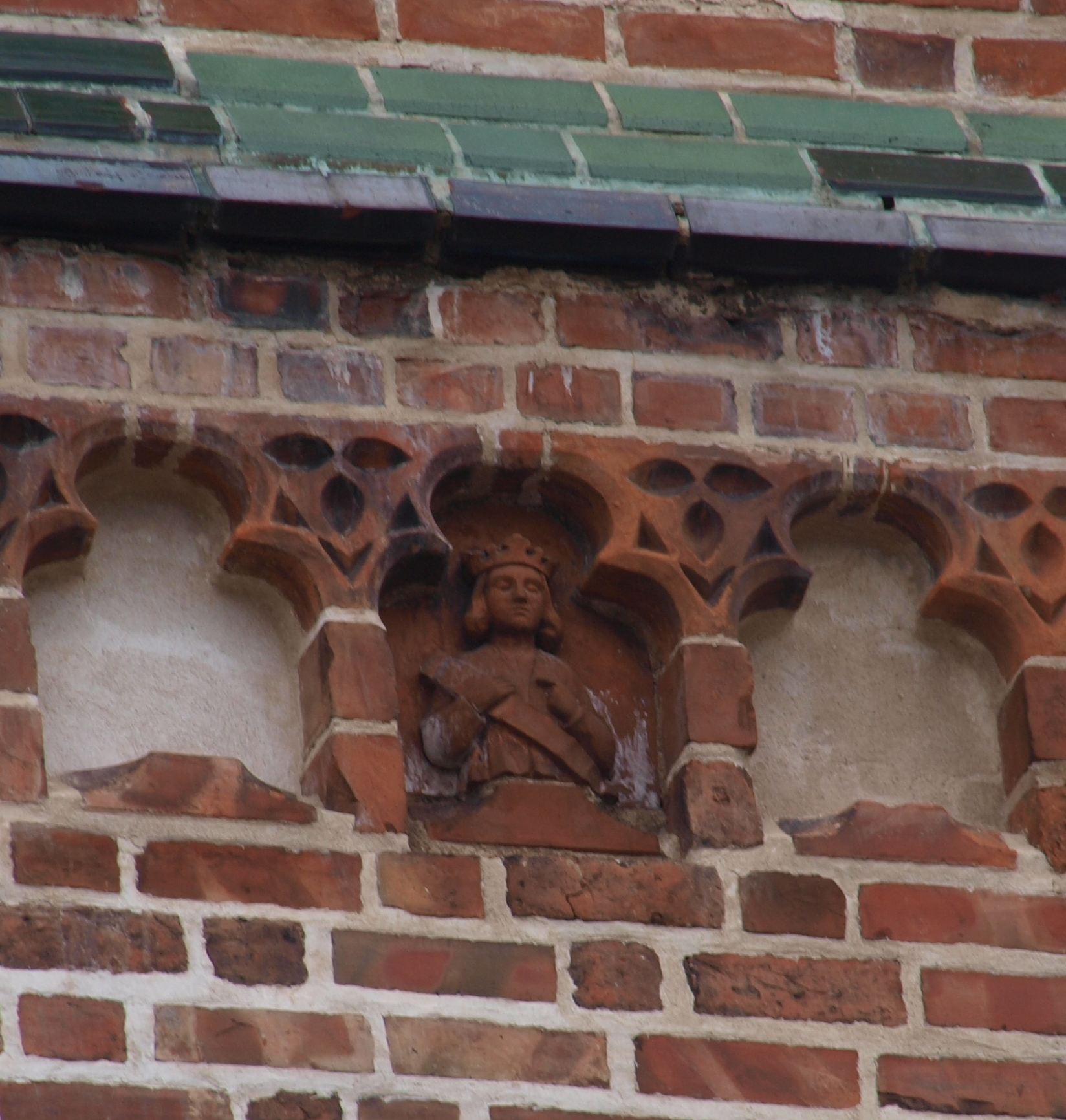 Tartu Jaani kirik, 14.saj.